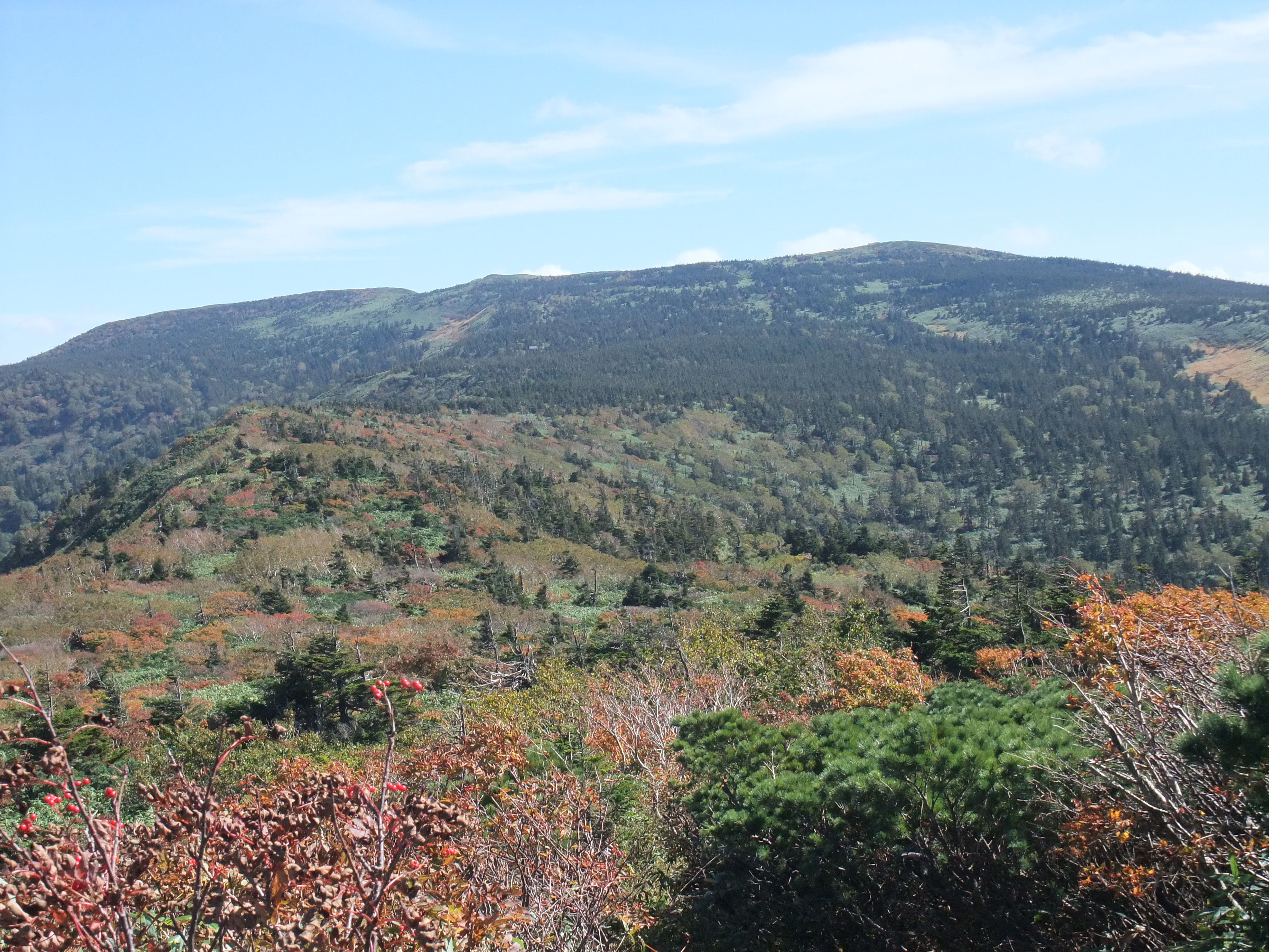 嶮岨森から望む大深岳